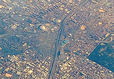 門真JCT 2011年10月16日、全日空機から